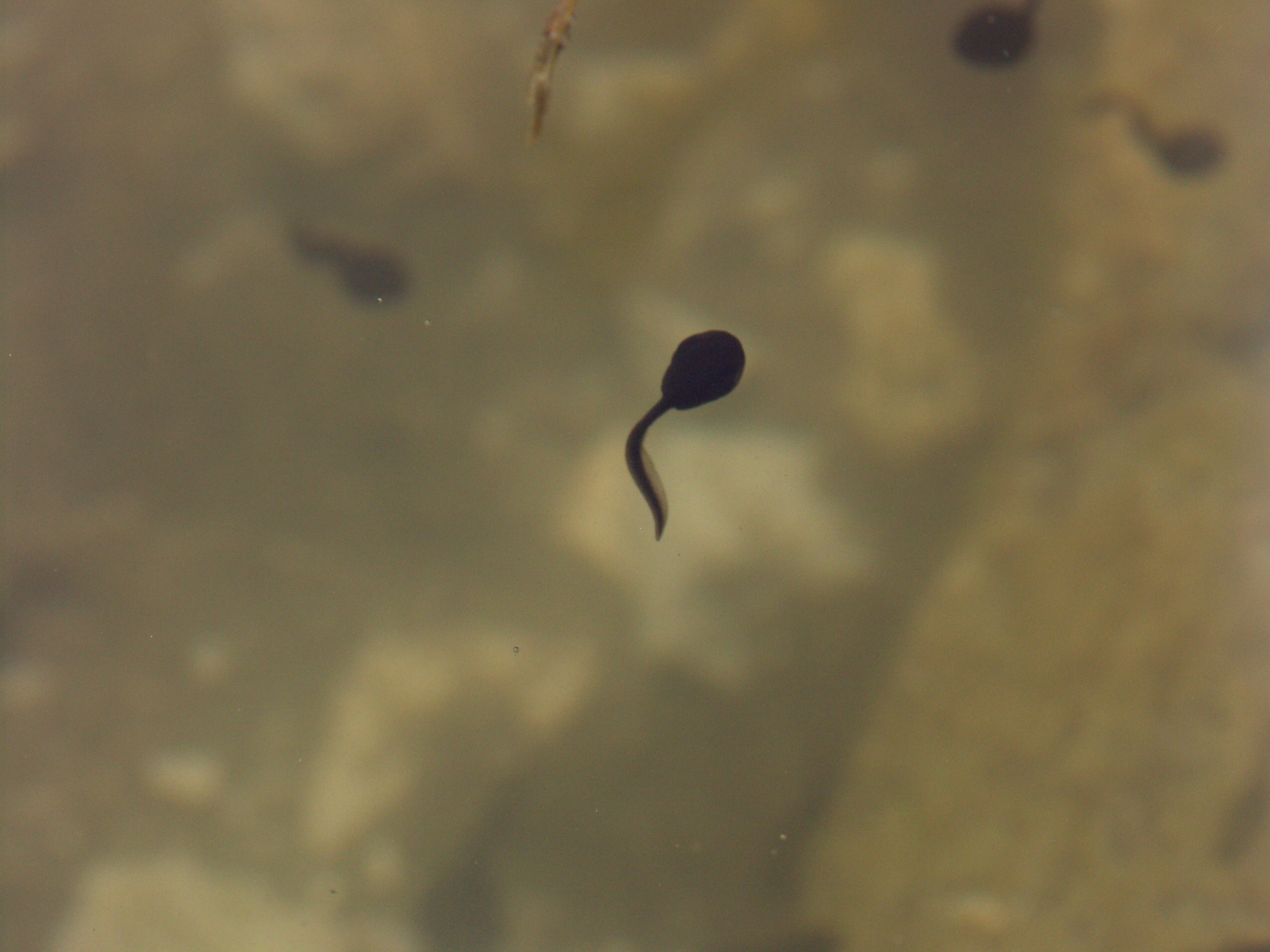 Author: Radovan Bahna, Slovak Republic, 2006